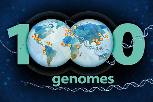 پروژه هزار ژنوم